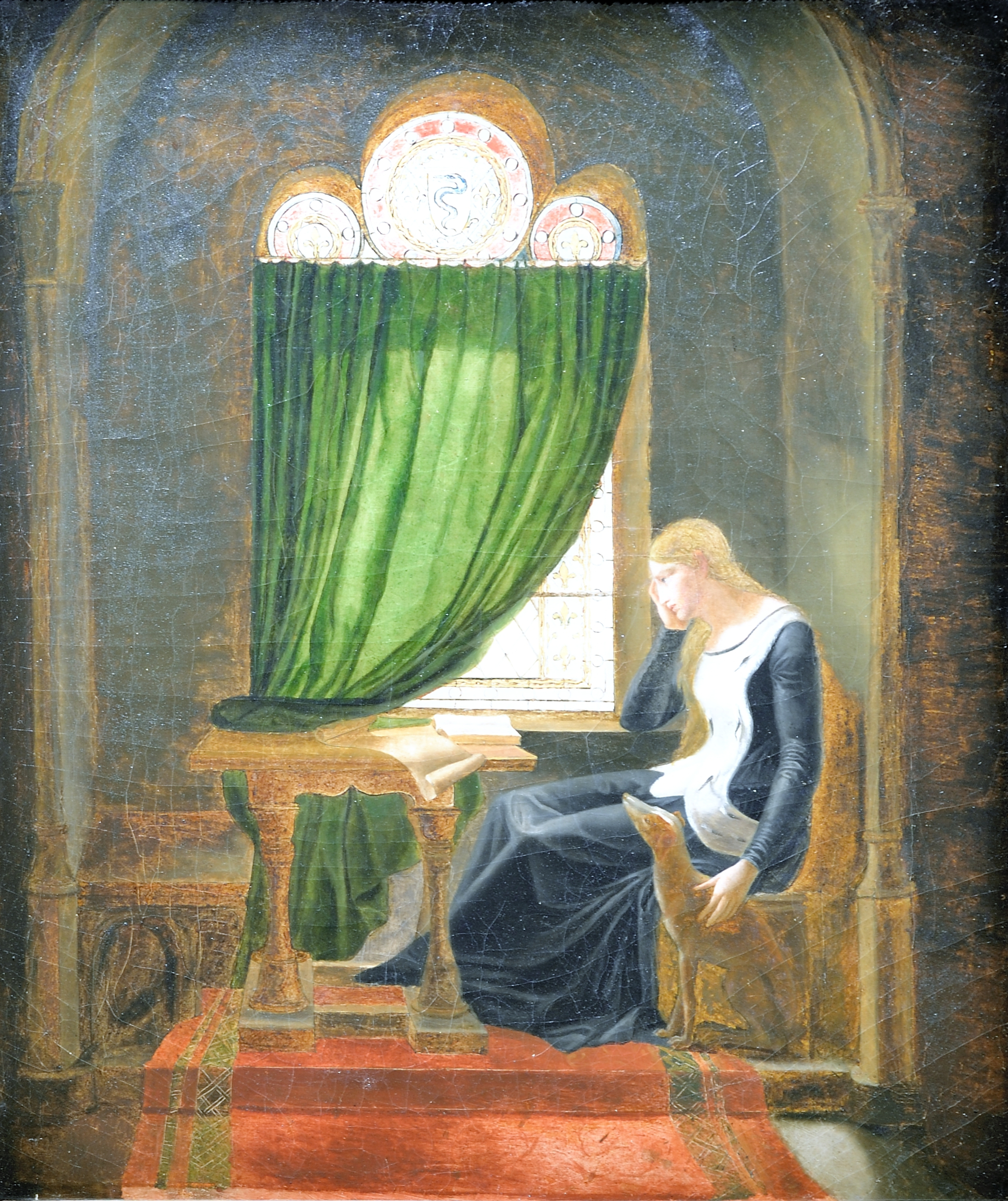 Valentine de Milan pleurant la mort de son époux Louis d’Orléans, assassiné en 1407, par Jean, duc de Bourgogne. Réplique inachevée, après 1802. Huile sur toile peinte par Fleury François Richard, œuvre exposée au Musée de beaux-arts de Lyon en 2014.